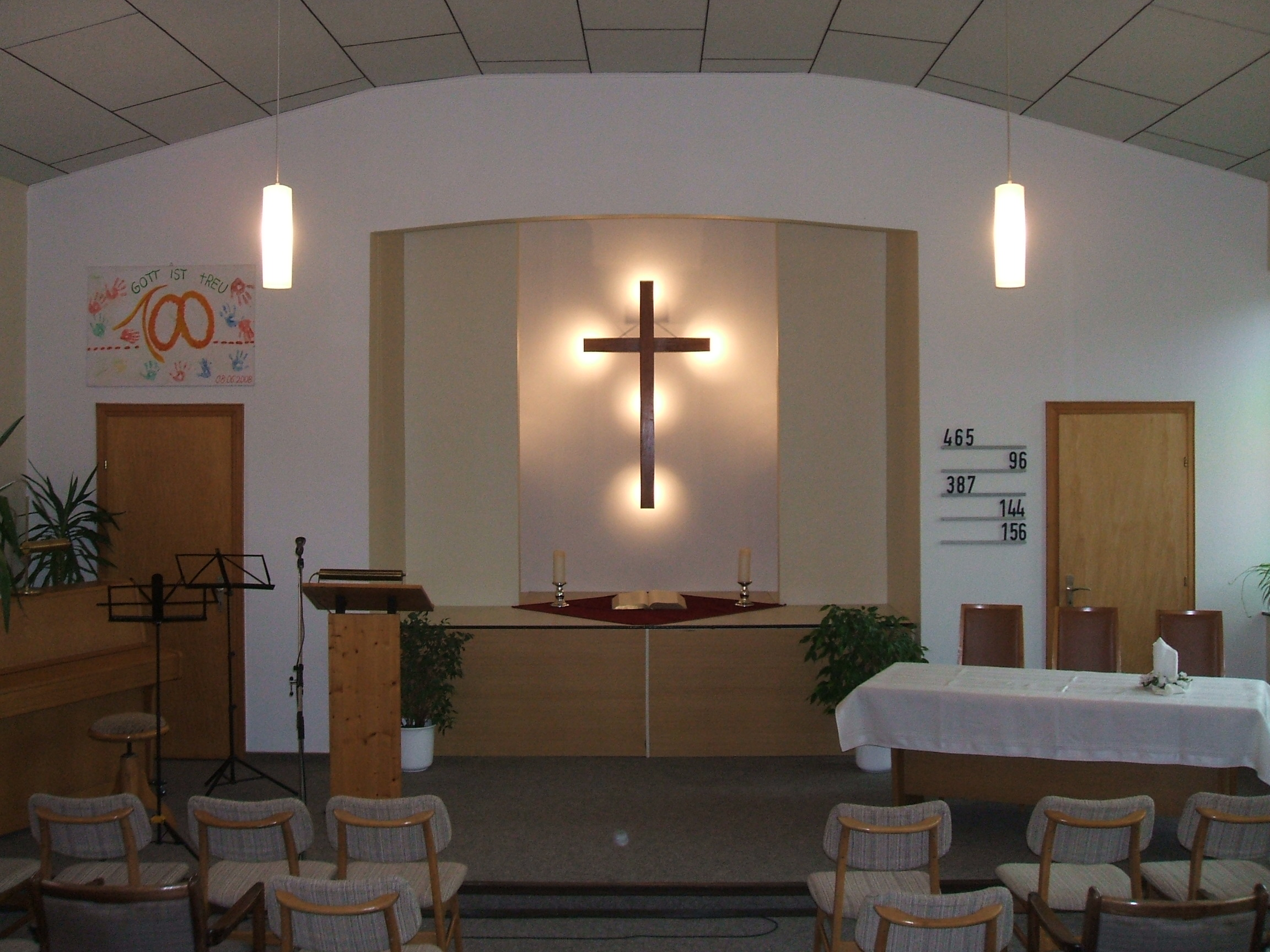 Gottesdienstraum der Baptistenkapelle Moorhusen